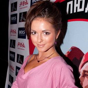 Певица Нюша на презентации нового клипа Дискотеки Авария «Нано-Техно» в ресторане «Ноа» 20 октября 2011 года